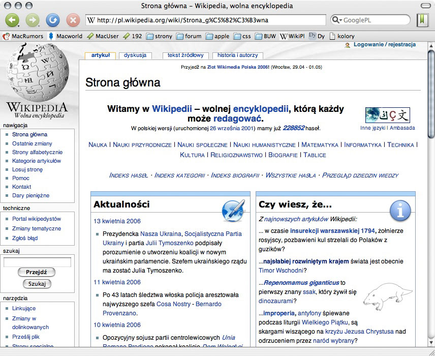 Zrzut ekranu przeglądarki internetowej Camino w wersji 1.0 dla systemu Mac OS X 10.4.6